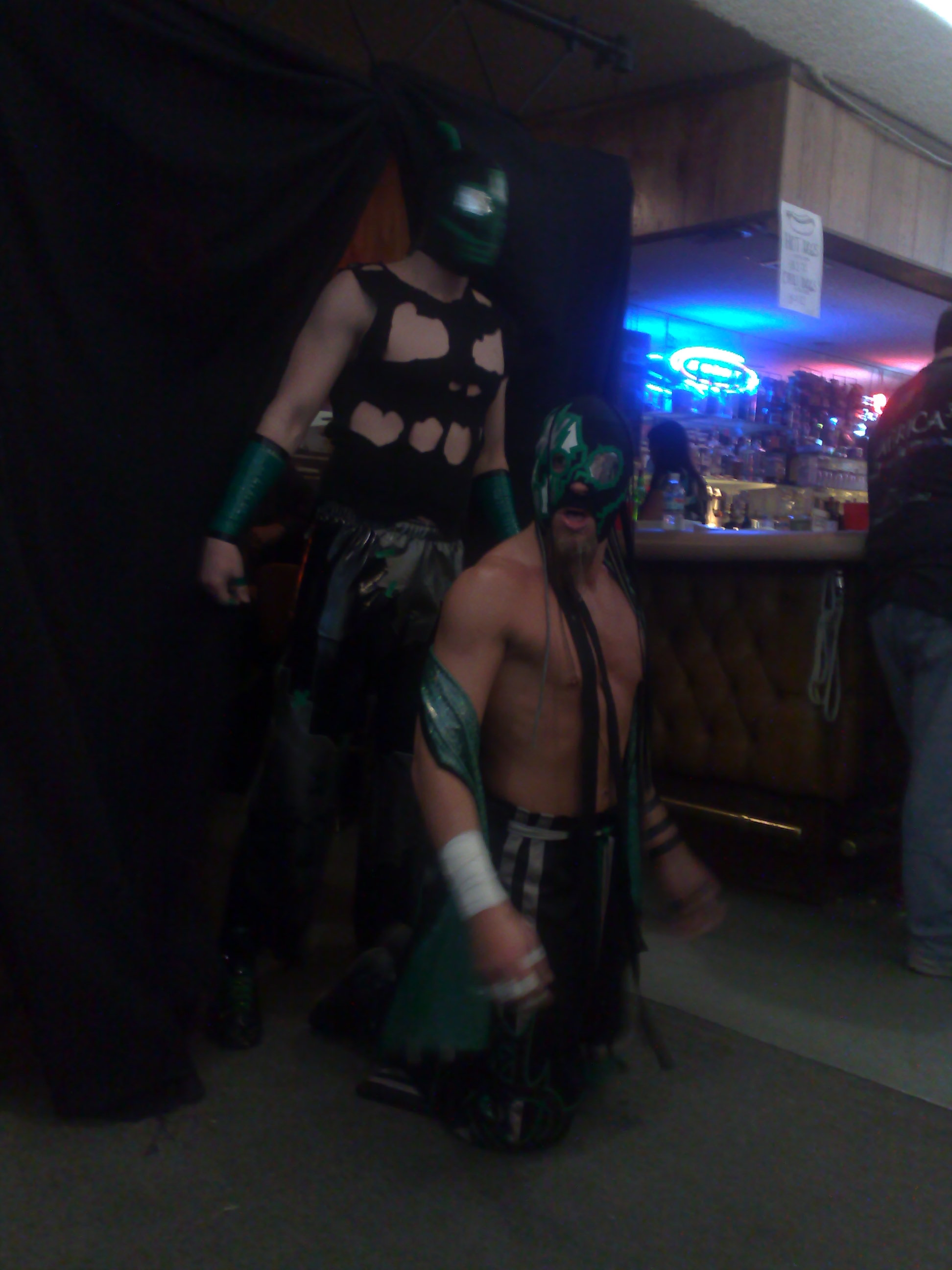 Incoherence entrance at PWG ¡Dia de los Dangerous!